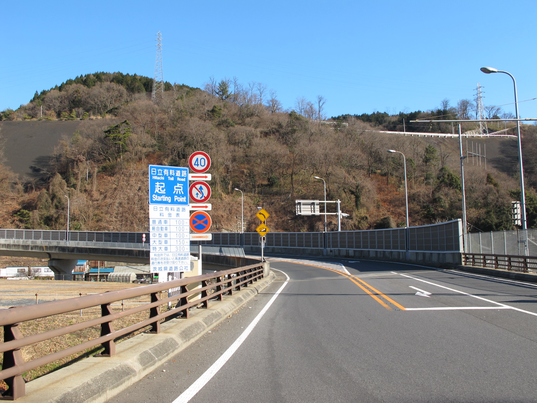 日立有料道路の起点